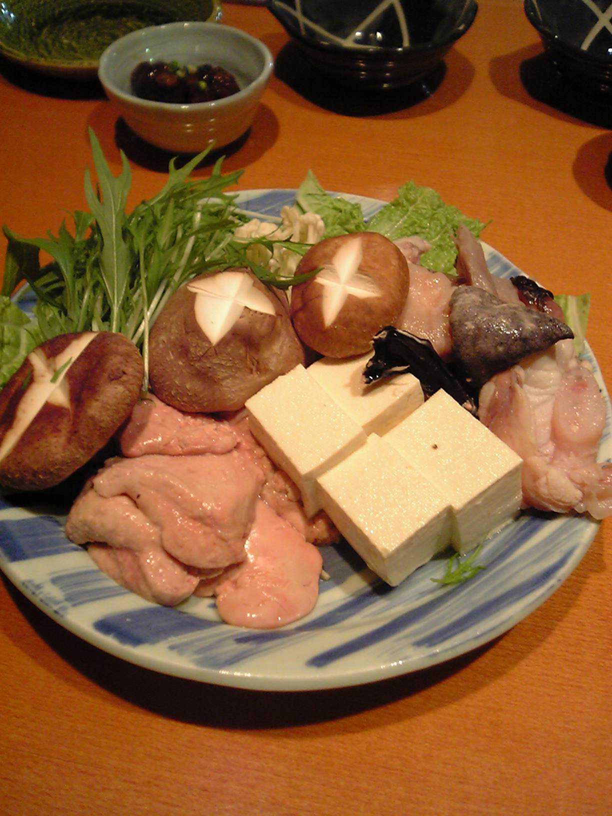 あんこう鍋の具材（2006年2月投稿者が撮影）